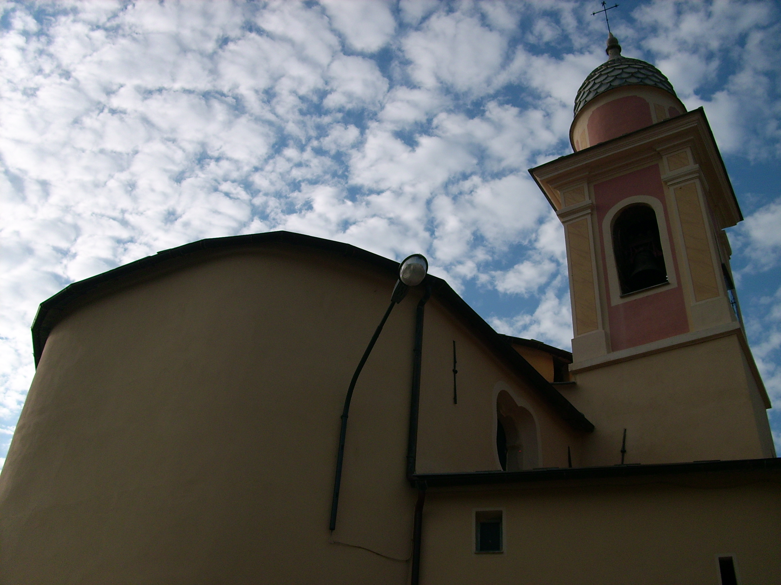 Chiesa parrocchiale di San Pantaleone, Borgoratto, frazione di Lucinasco, Liguria, Italia